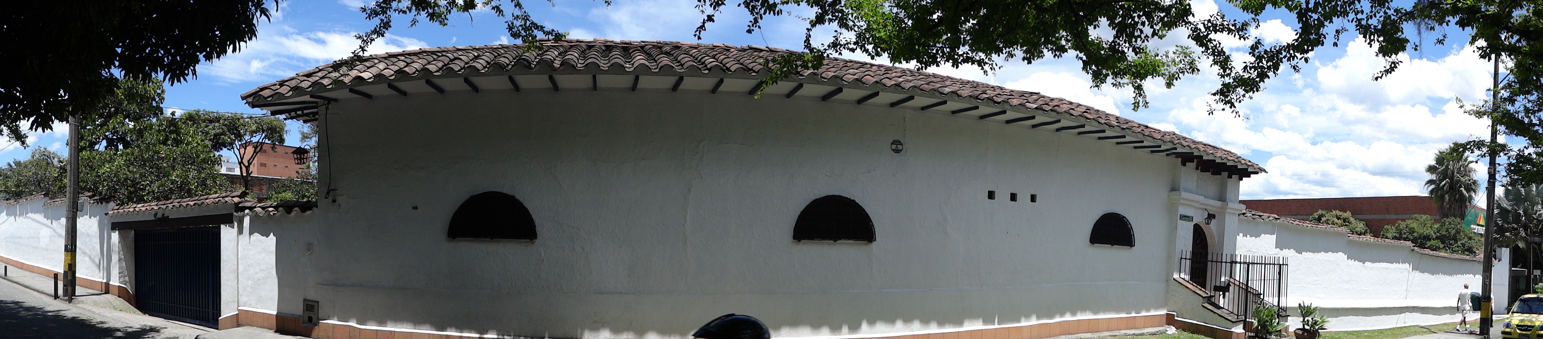 Casa Museo Débora Arango Pérez Casa en que vivió Débora Arango Pérez